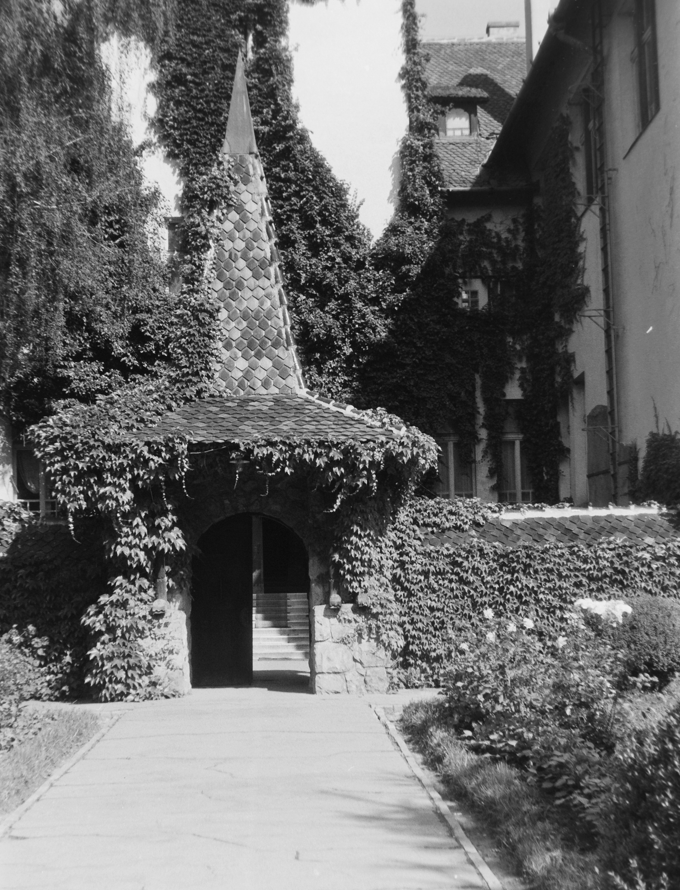 Székely Nemzeti Múzeum bejárata. Location: Romania, Transylvania, Sfantu Gheorghe Title: Székely Nemzeti Múzeum bejárata.